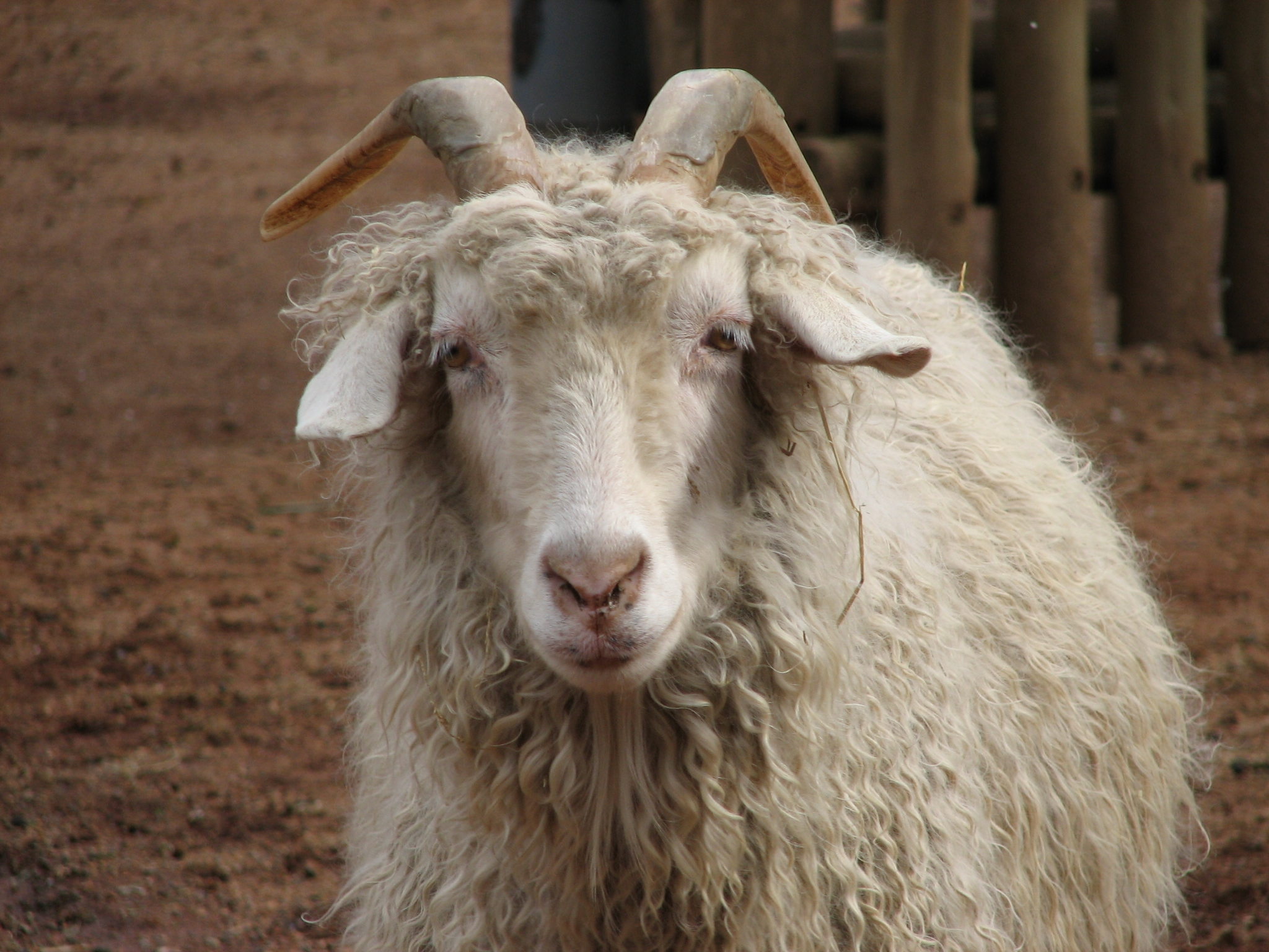 Angora Goat